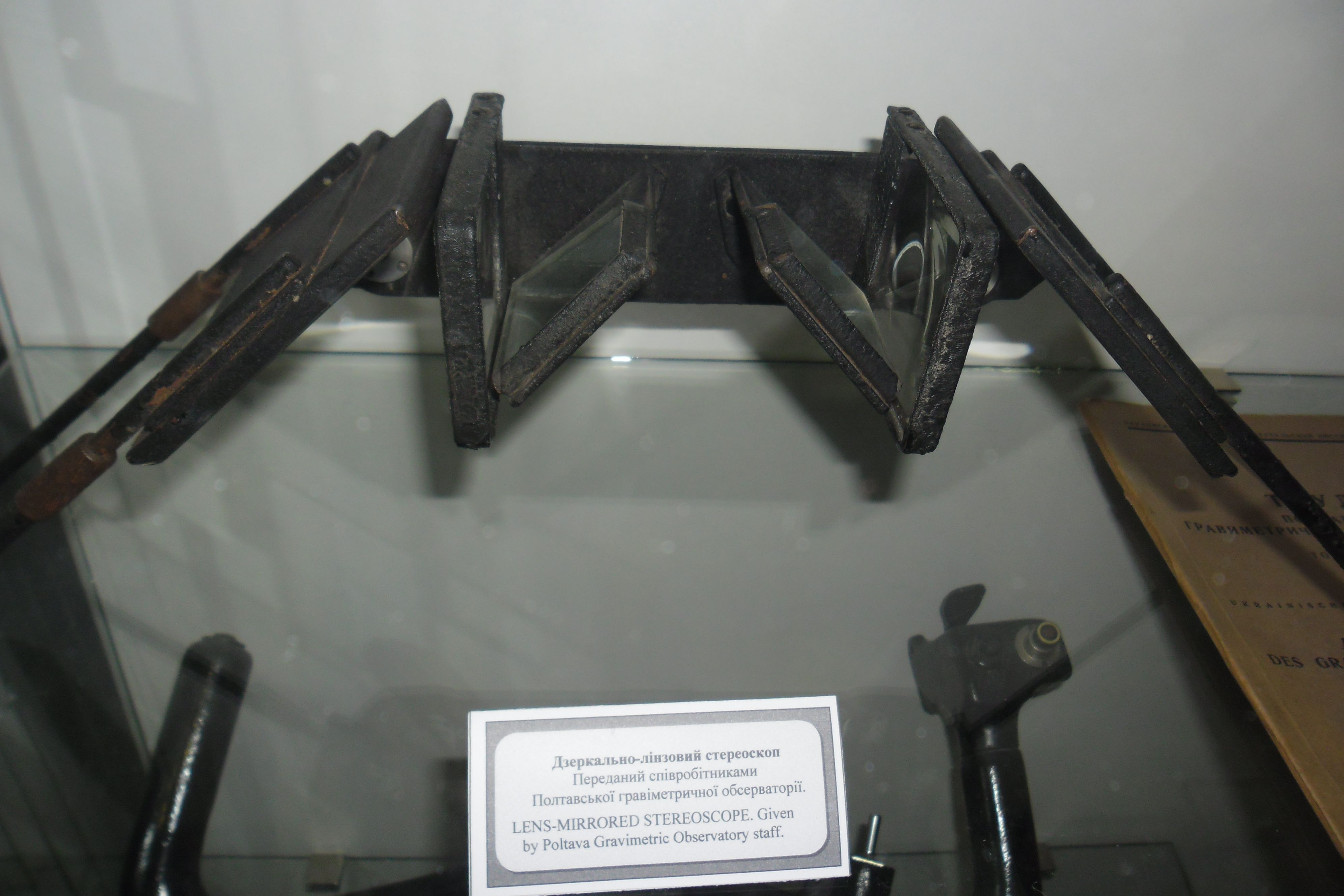 Стереоскоп